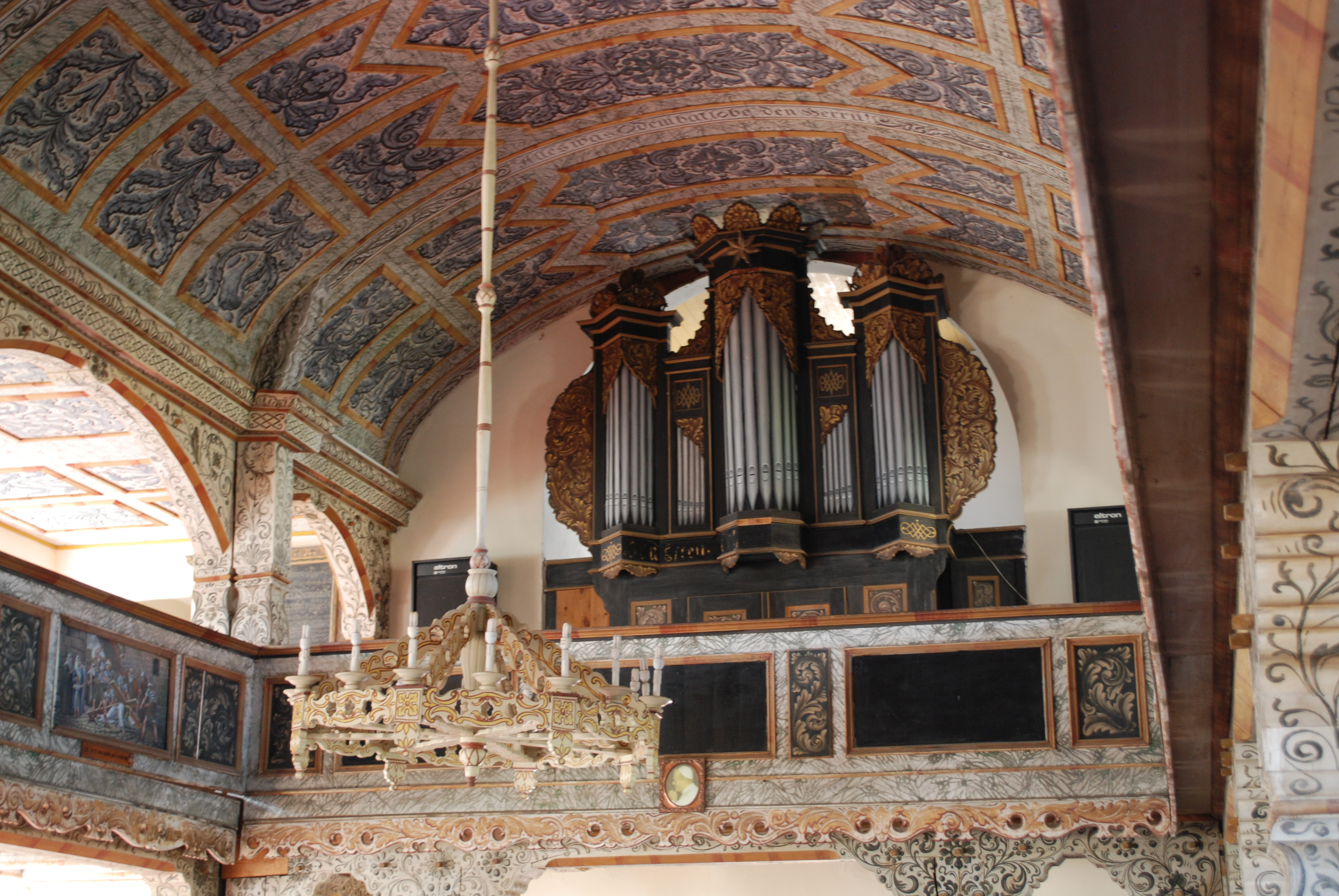 Okartowo, kościół ewangelicki ob. rzym.-kat. par. pw. Niepokalanego Serca NMP, kon. XVIII